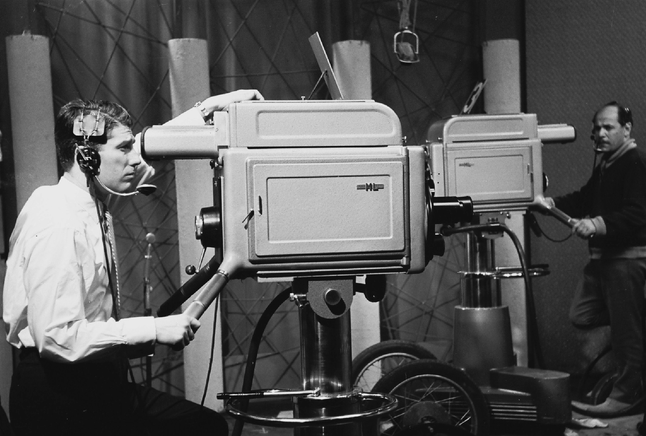 MTV stúdió, a Mechanikai Laboratórium (Mechlabor) által gyártott kamerák. Location: Hungary, Budapest V. Tags: Hungarian TV, Budapest Title: MTV stúdió, a Mechanikai Laboratórium (Mechlabor) által gyártott kamerák.